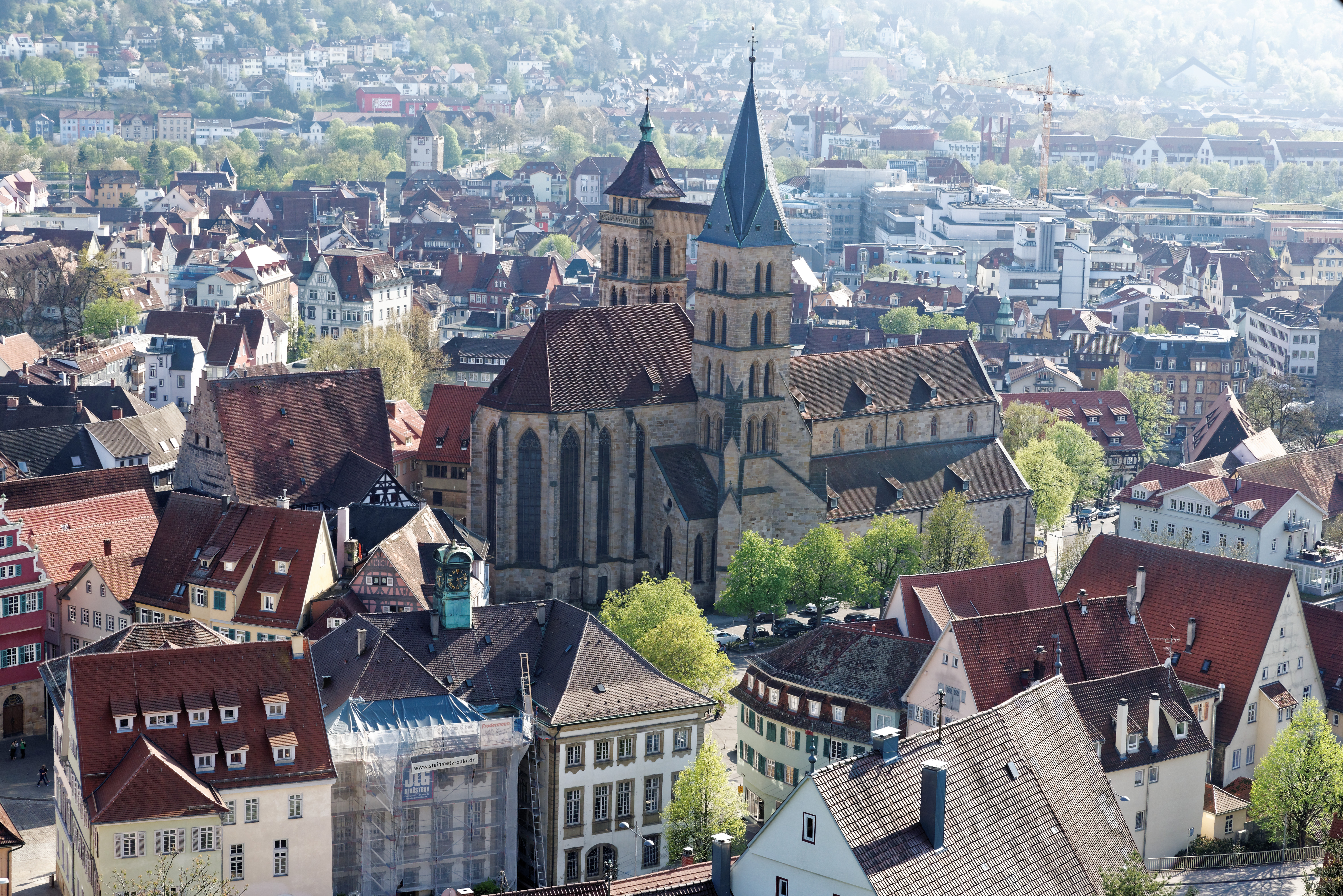 Blick auf die Esslinger Stadtkirche von Burg.